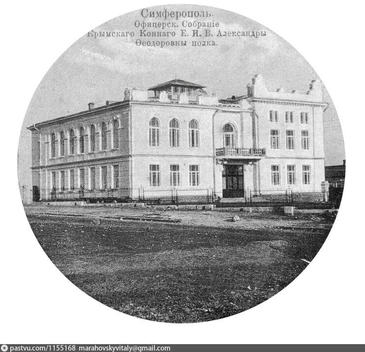 Офицерское собрание Крымский конный Её Величества Государыни Императрицы Александры Фёдоровны полк, Симферополь